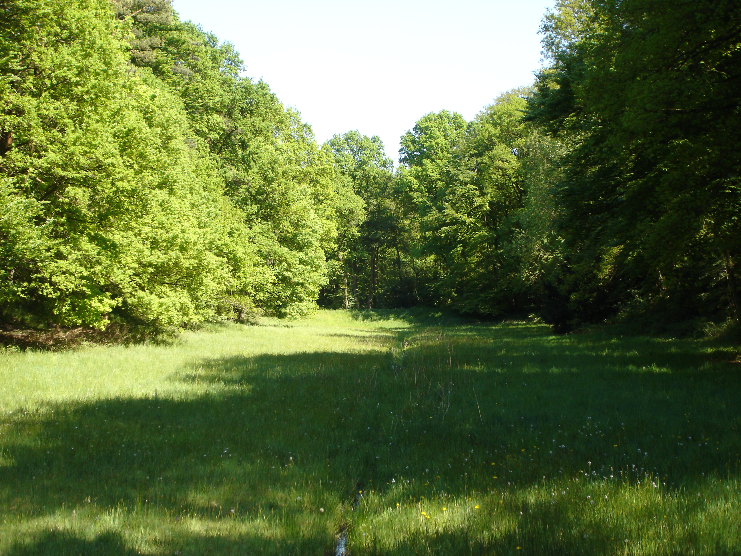 Die sogenannten "Schlenke", das alte Flussbett der Ems, auf dem Waldfriedhof Lauheide bei Münster, Westfalen, Deutschland